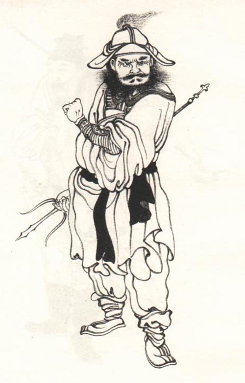 俞通海，明朝军事将领。